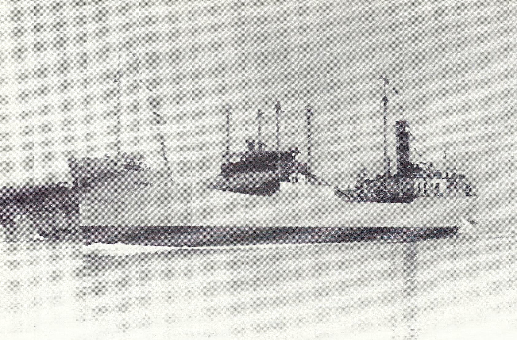 Fraktdamperen Havmøy. Sjøsatt i 1934